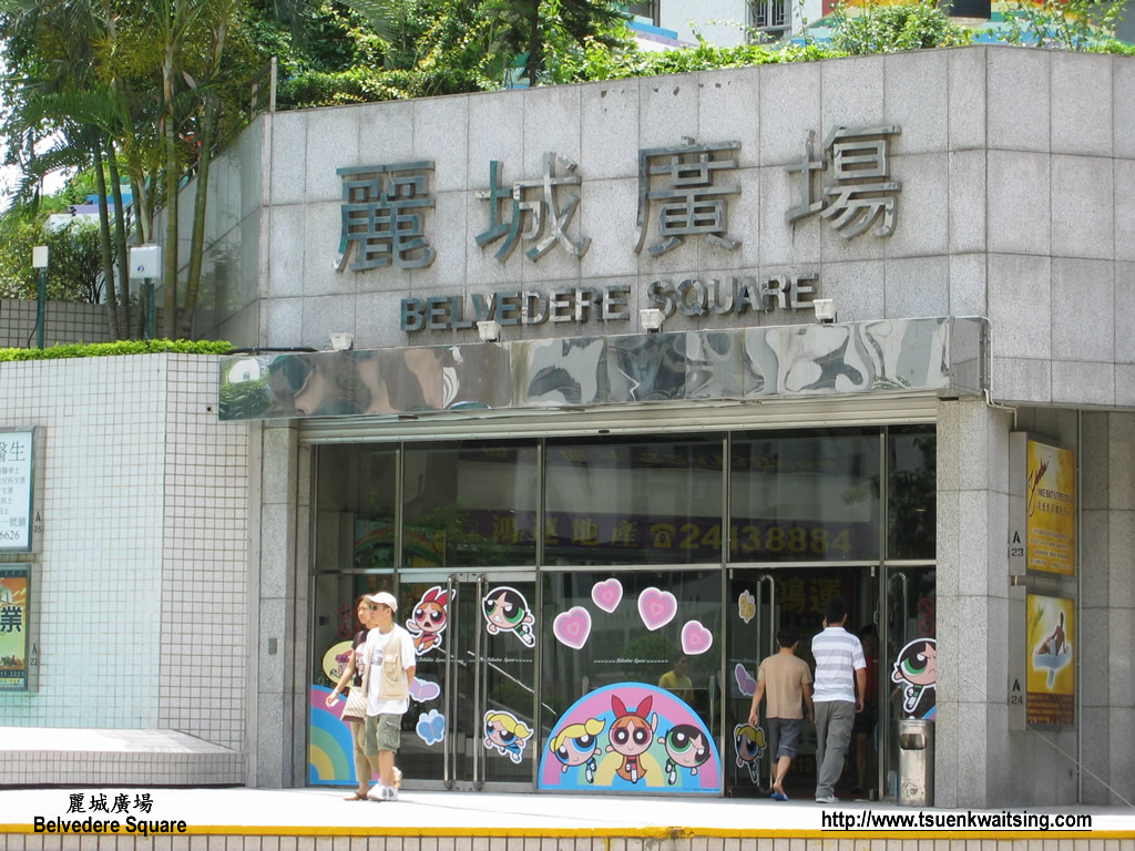 Belvedere Square, Belvedere Garden, Tsuen Wan, New Territories, Hong Kong